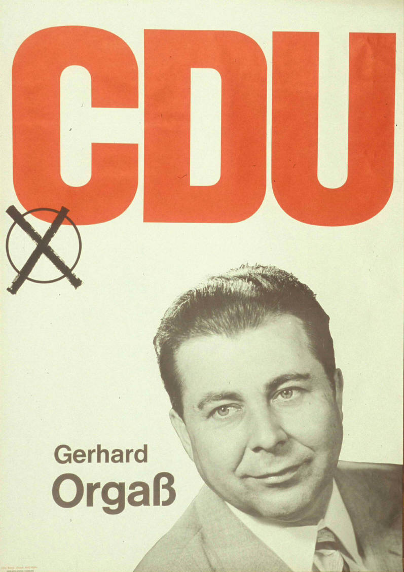 CDU Gerhard Orgaß Abbildung: Porträtfoto - Stimmkreuz Plakatart: Kandidaten-/Personenplakat mit Porträt Auftraggeber: CDU Bonn Drucker_Druckart_Druckort: KVD, Köln Hobusch-Druck, Hamburg Objekt-Signatur: 10-001 : 1337 Bestand: Plakate zu Bundestagswahlen (10-001) GliederungBestand10-18: Plakate zu Bundestagswahlen (10-001) » Die 6. Bundestagswahl am 28. September 1969 » CDU » Mit Porträtfoto Lizenz: KAS/ACDP 10-001 : 1337 CC-BY-SA 3.0 DE